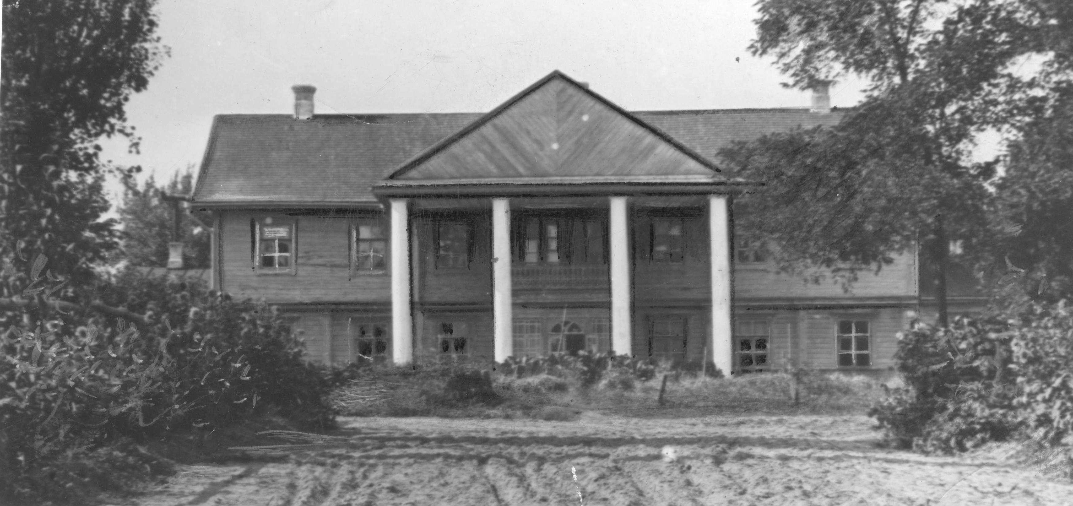 Беларуская (тарашкевіца): Парахонск (Parachonsk), сядзіба Друцкіх-Любецкіх (Drucki-Lubiecki)